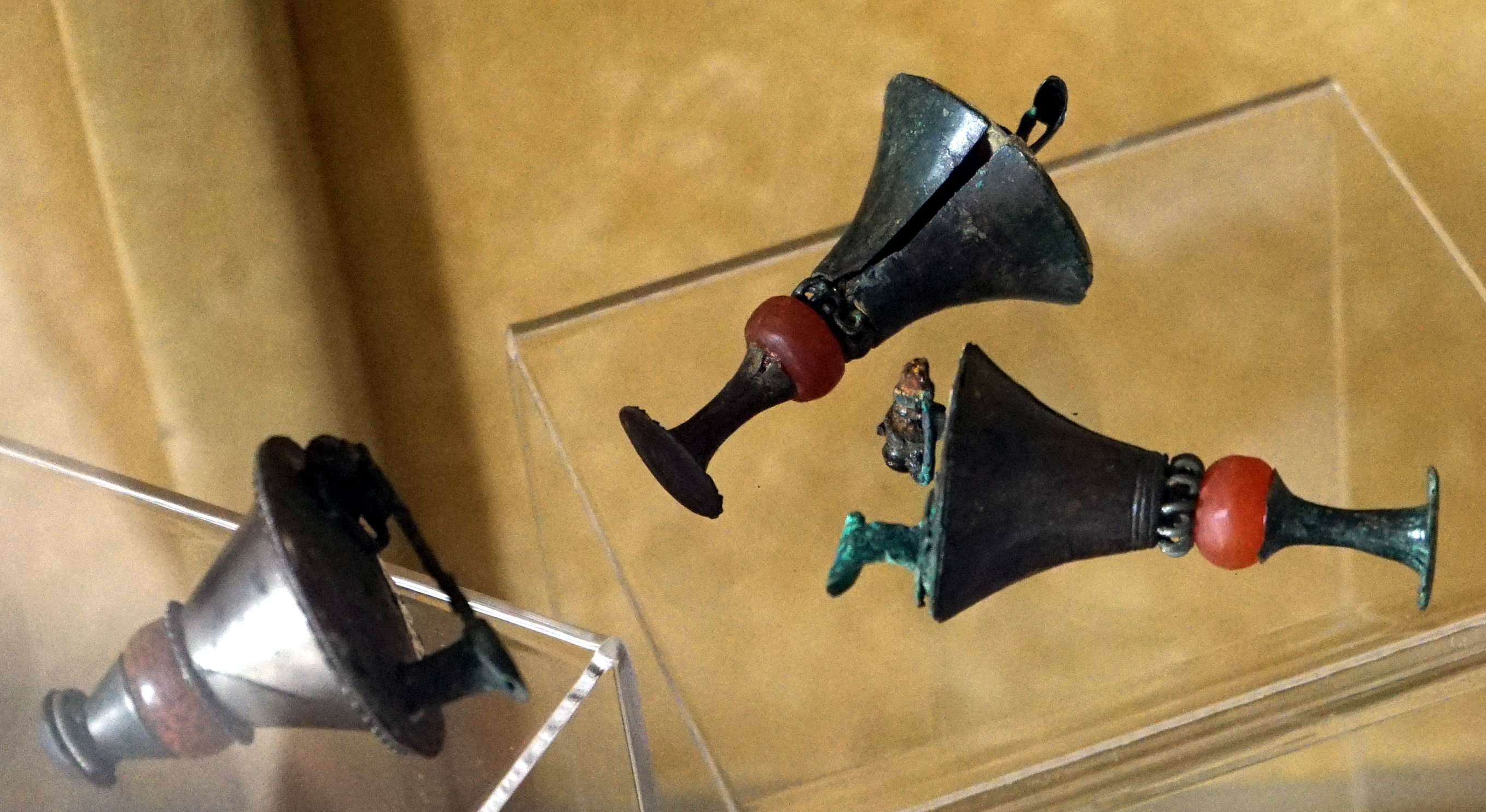 exposition temporaire au musée st-Remi.